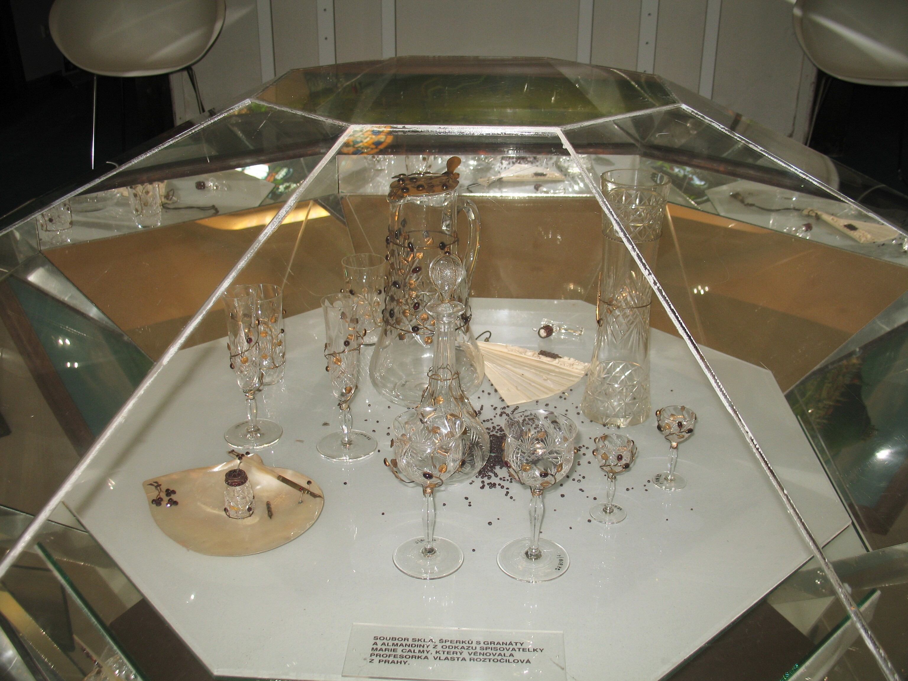 Skleněné výrobky, zdobené pyropy a almandiny